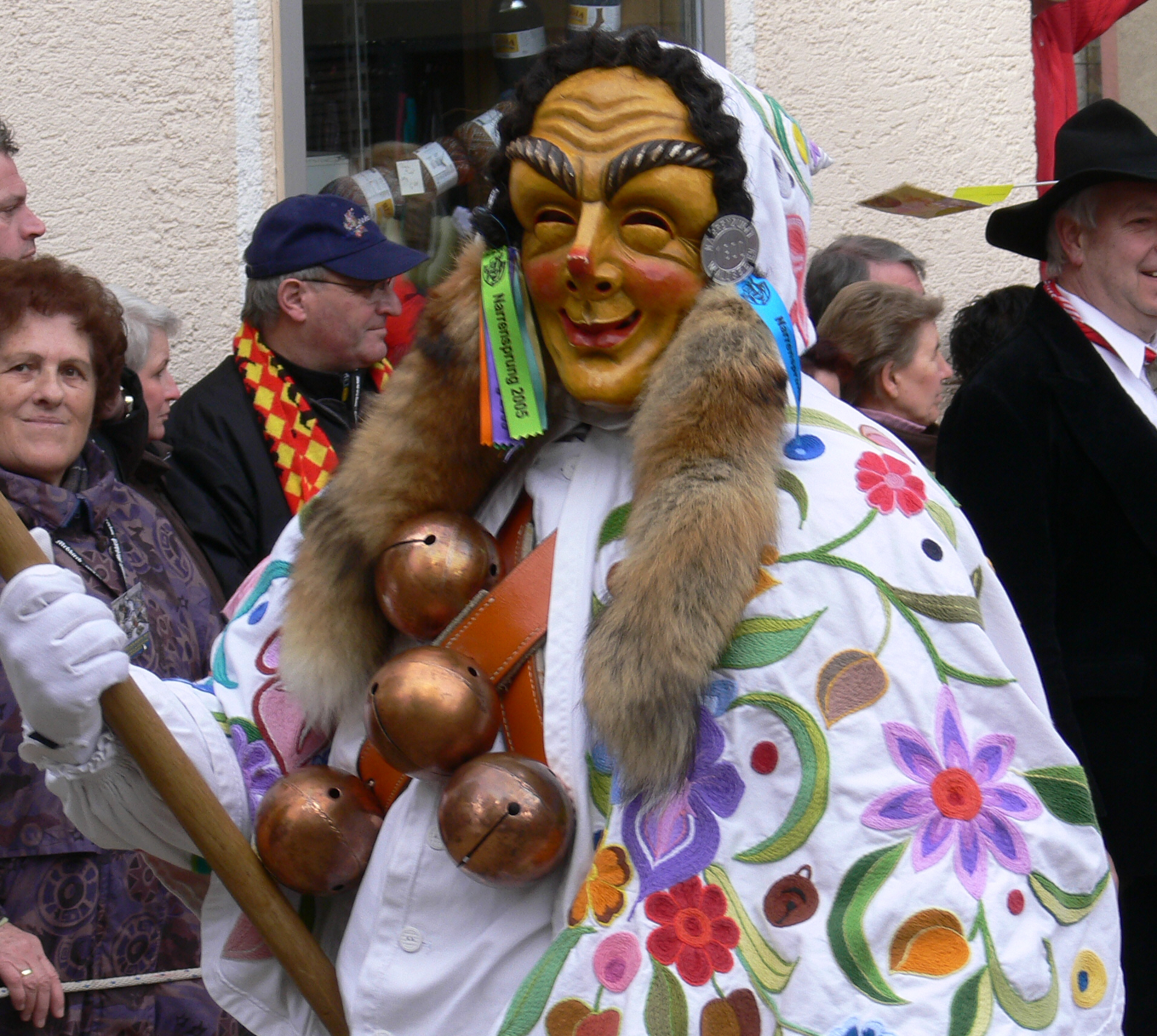 Narrenzunft Bad Waldsee, Figur: Faselhannes Veranstaltung: Narrensprung beim Narrentreffen Meßkirch 2006